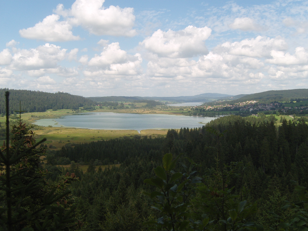 Lac de Remoray-Boujons, au premier plan, lac de Saint-Point, au second plan, vus depuis le "belvédère des Deux-Lacs", commune de Brey-et-Maison-du-Bois, Doubs, France.